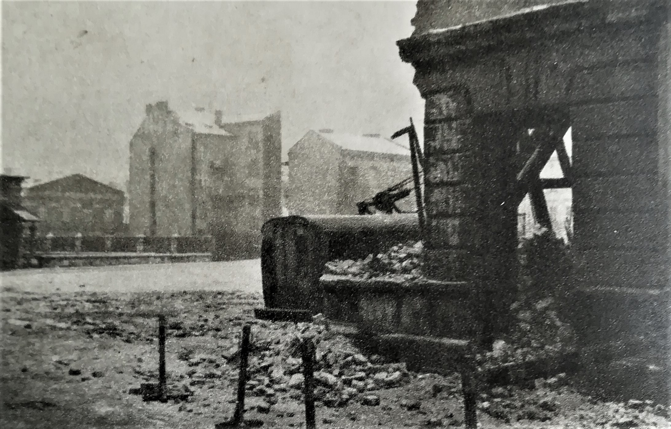 Ulica Józefa w Krakowie, zniszczona przez filmowców kręcących film "Noce i Dnie" w 1975 r. - teren grał pożar Kalińca (Kalisza).